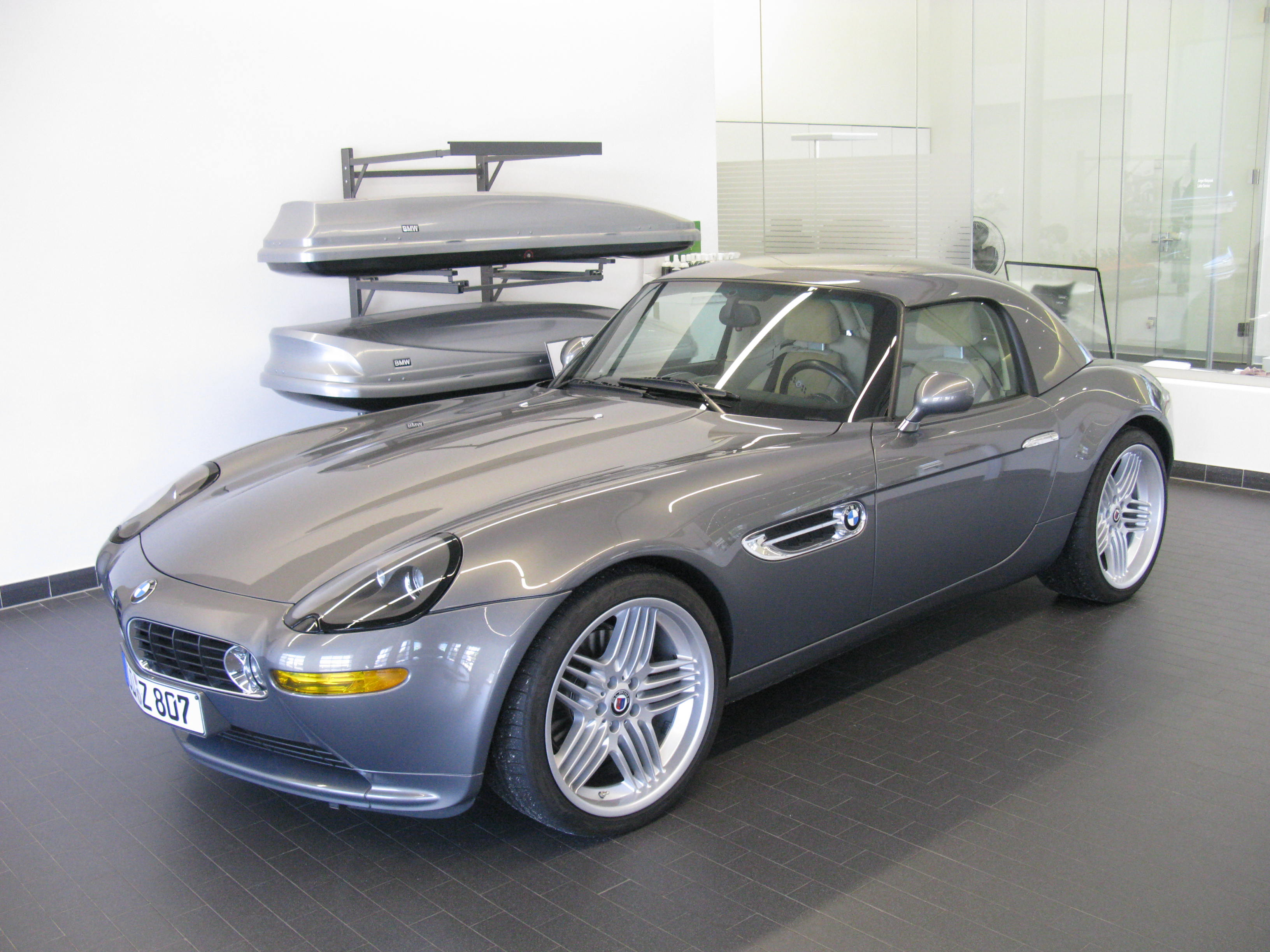 BMW Niederlassung Hamburg